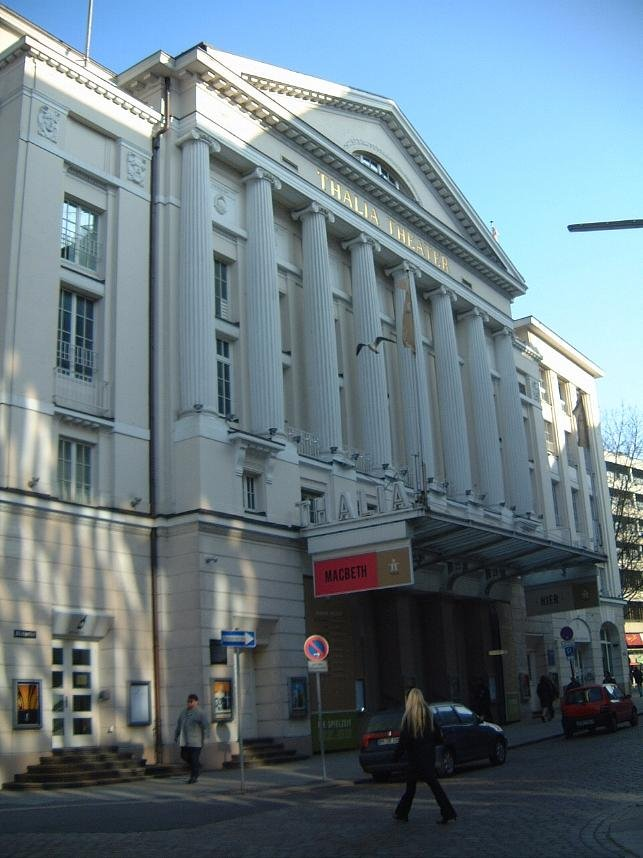 Das am Alstertor 2, Gerhart-Hauptmann-Platz 70, Raboisen 67 in Hamburg-Altstadt gelegene Thalia-Theater wurde 1912 nach Plänen von Lundt & Kallmorgen errichtet. This is a photograph of an architectural monument.